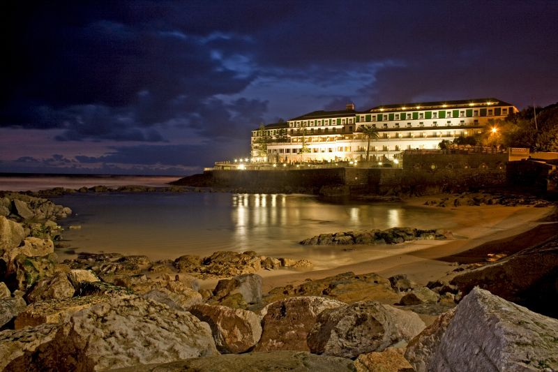 Explore #346 - 11.3.2008